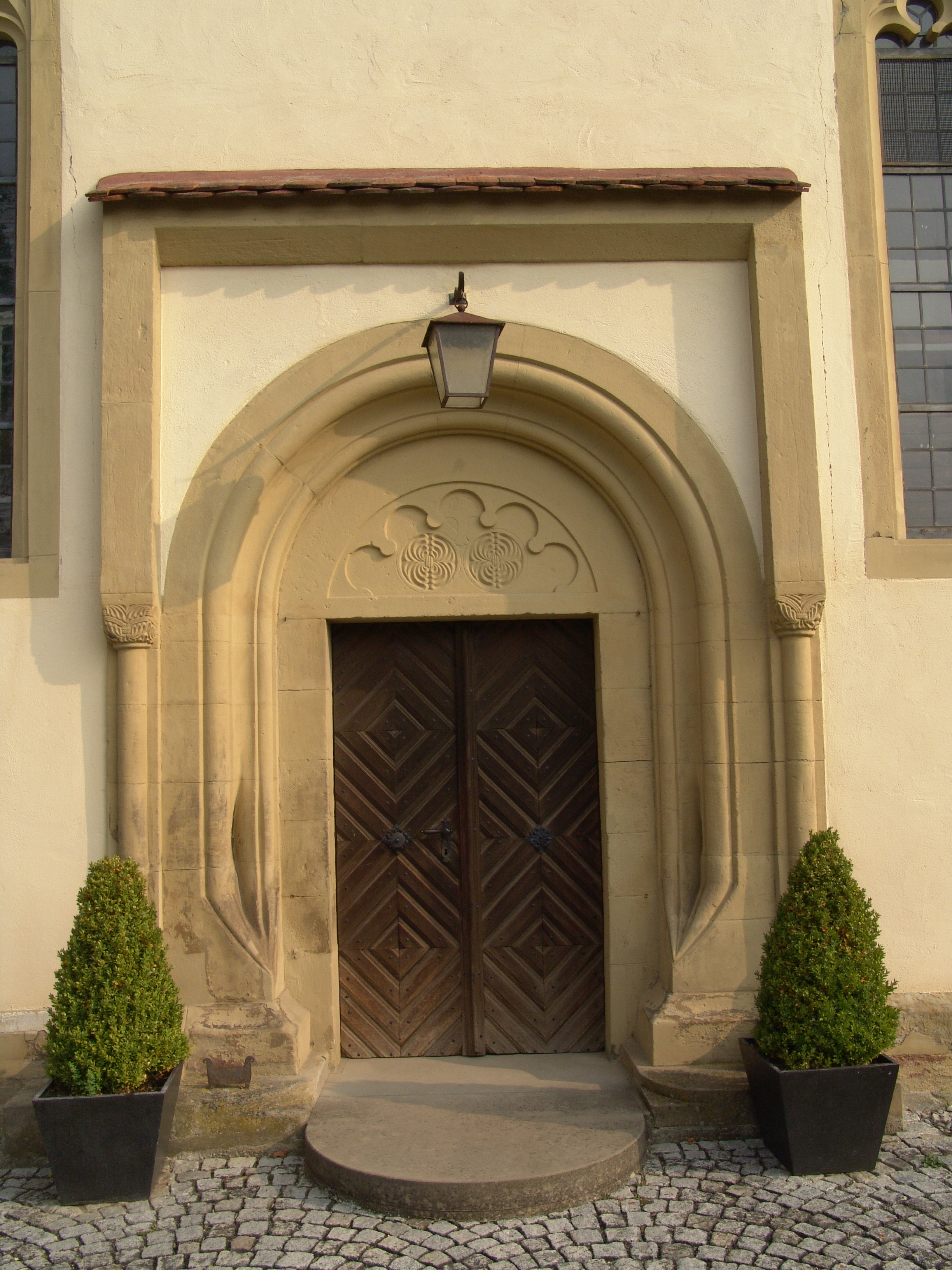 evang.-luth. Kirche St. Johannes in Gnötzheim